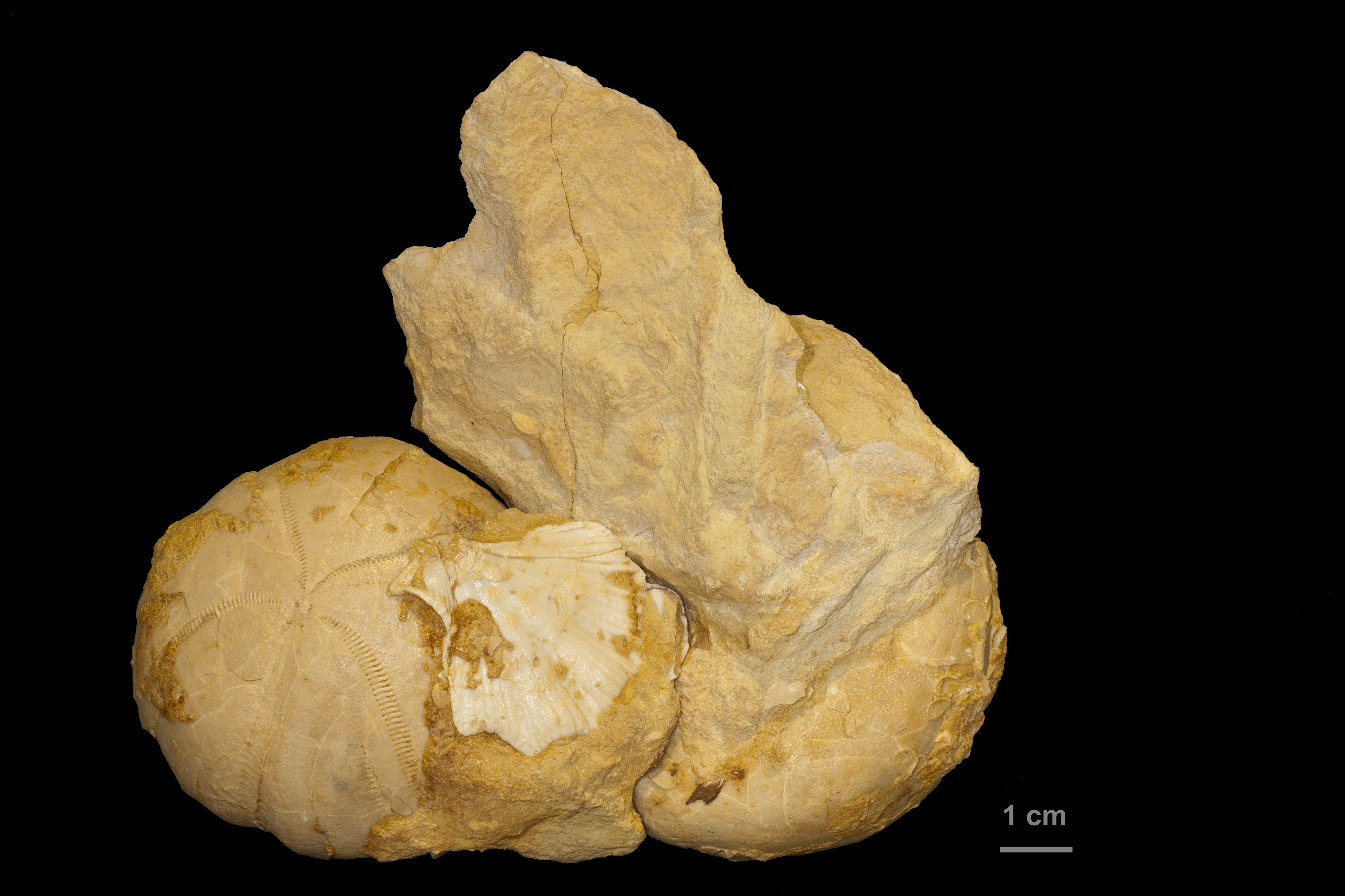 Stratigraphie: Série: Crétacé sup, Étage: Maastrichtien. Taxinomie: Embranchement: Echinodermata, Classe: Echinoidea, Ordre: Holasteroida, Famille: Hemipneustidae. Lieux de découverte: Larcan, Haute-Garonne, France Museum of Toulouse Native nameMuséum de ToulouseLocationToulouse, FranceCoordinates43° 35′ 38″ N, 1° 26′ 57″ E Established1796: established ; 1865: opened to publicWebsite control VIAF: 130895847 ISNI: 0000 0001 2158 3469 SUDOC: 028667107 BNF: 120455376 Museofile: M7013 MHNT.PAL.2006.102.3